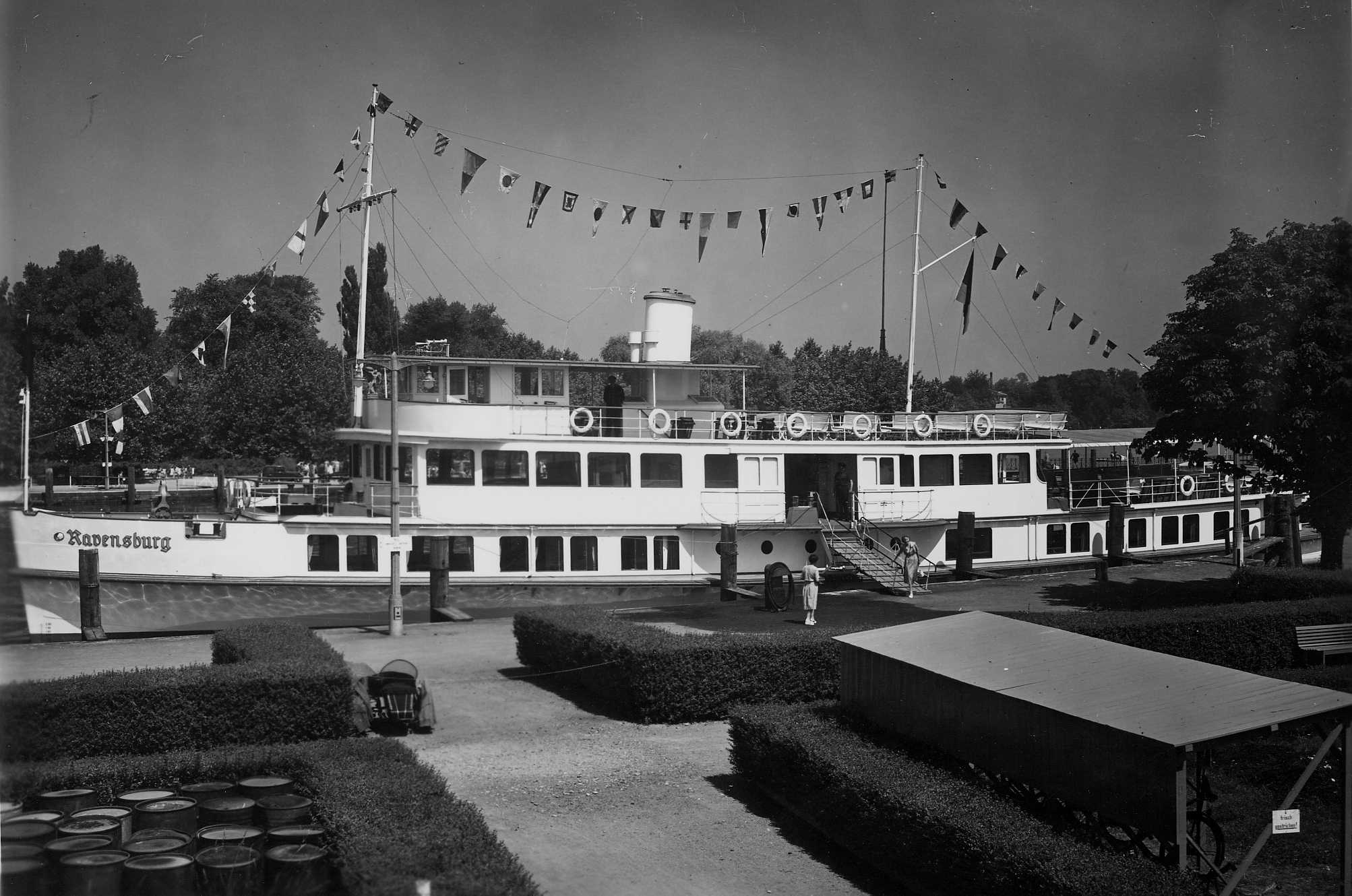 Die Ravensburg im Hafen von Konstanz